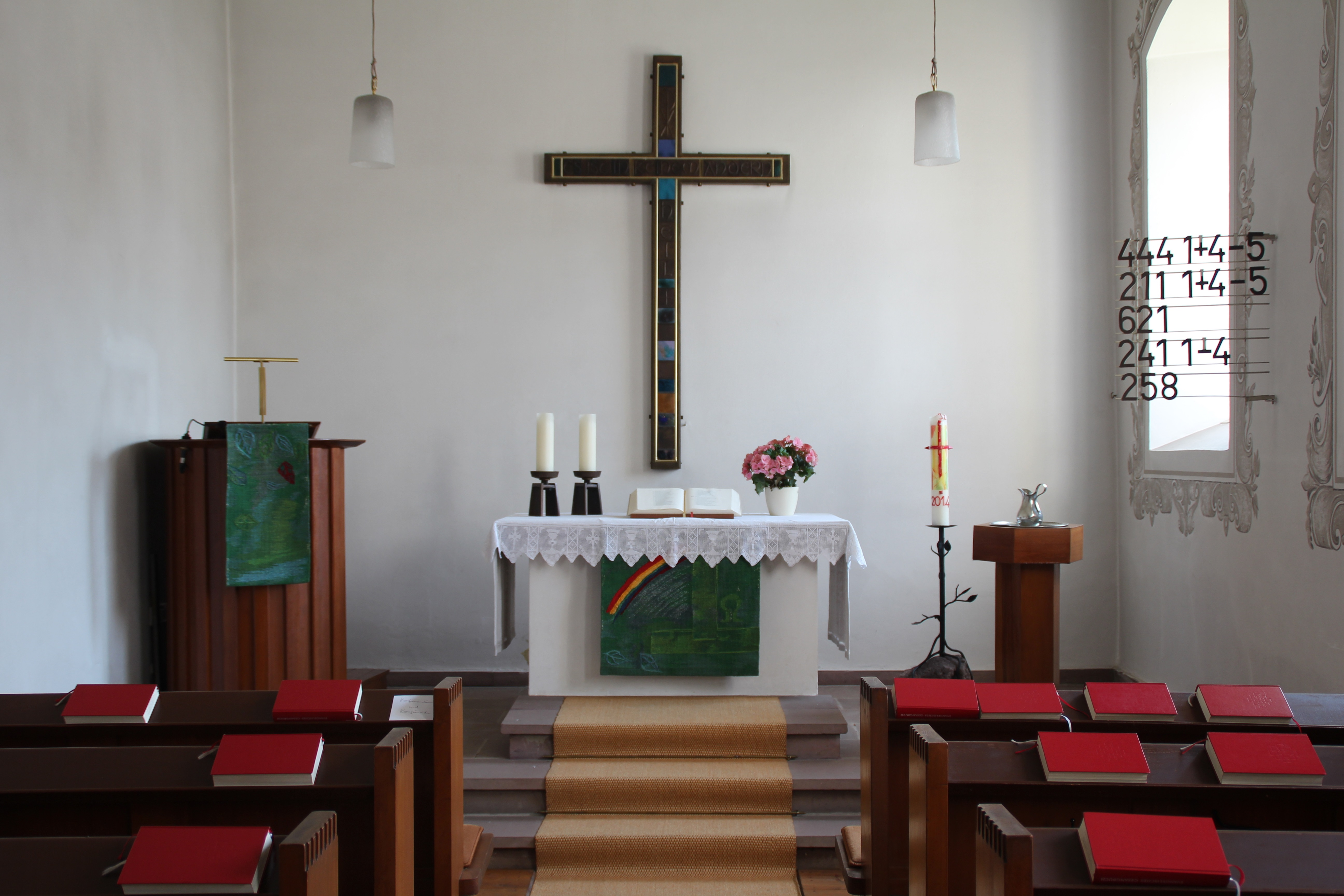 Innenraum der Evangelischen Kirche Lindenstruth, Gemeinde Reiskirchen, Landkreis Gießen, Hessen, Deutschland